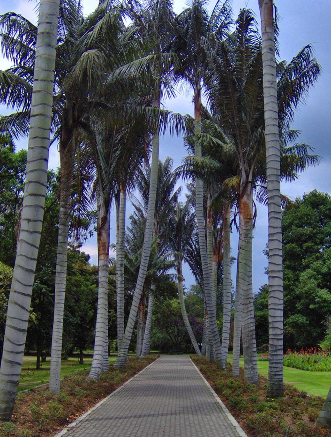 Ceroxylon quindiuense (es) Palma de cera. (en) Wax palm.